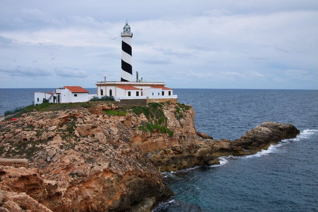 Far del Cap de Cala Figuera, Calviá.